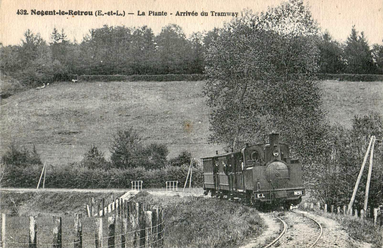 Carte postale ancienne éditée par Ch. Chauffroy, photographe-éditeur à Nogent-le-Rotrou, n°432 : Nogent-le-Rotrou - La Plante - Arrivée du Tramway Passage du Tramway d'Eure-et-Loir à Nogent-le-Rotrou.